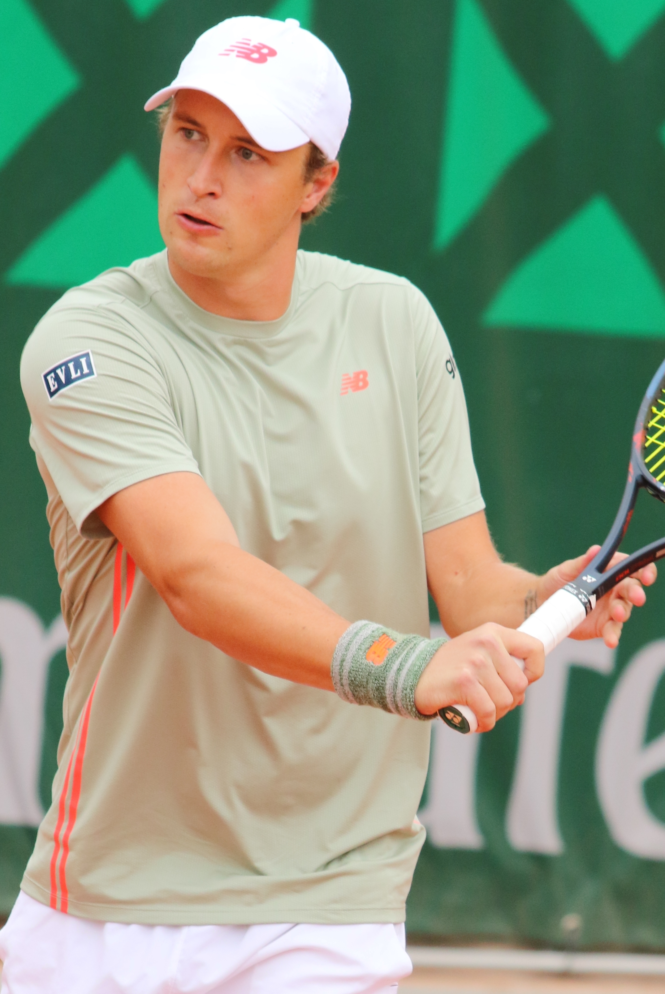 Kontinen RG18 (19)